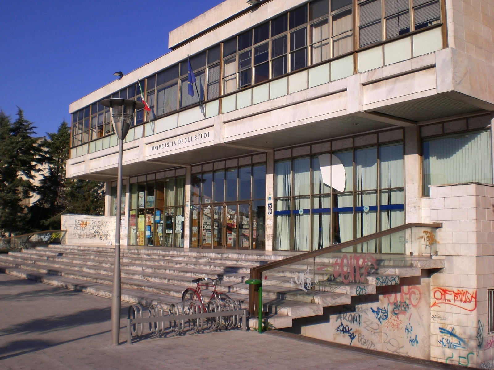 Facciata dell'Ateneo di Lecce